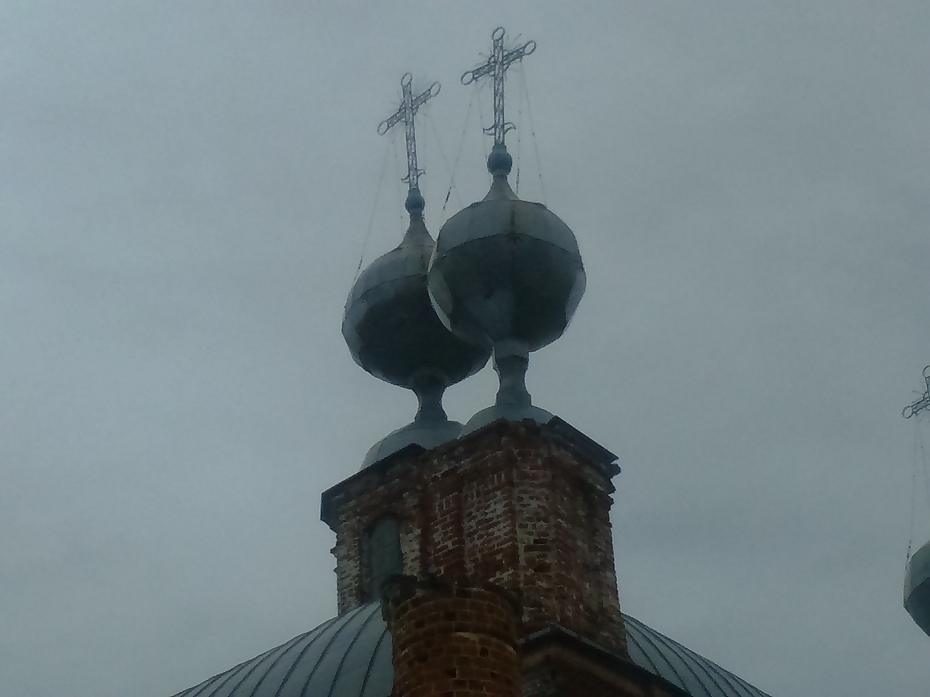 Изящная форма куполов храма Пророка Илии в селе Ильинское Селивановского района Владимирской области